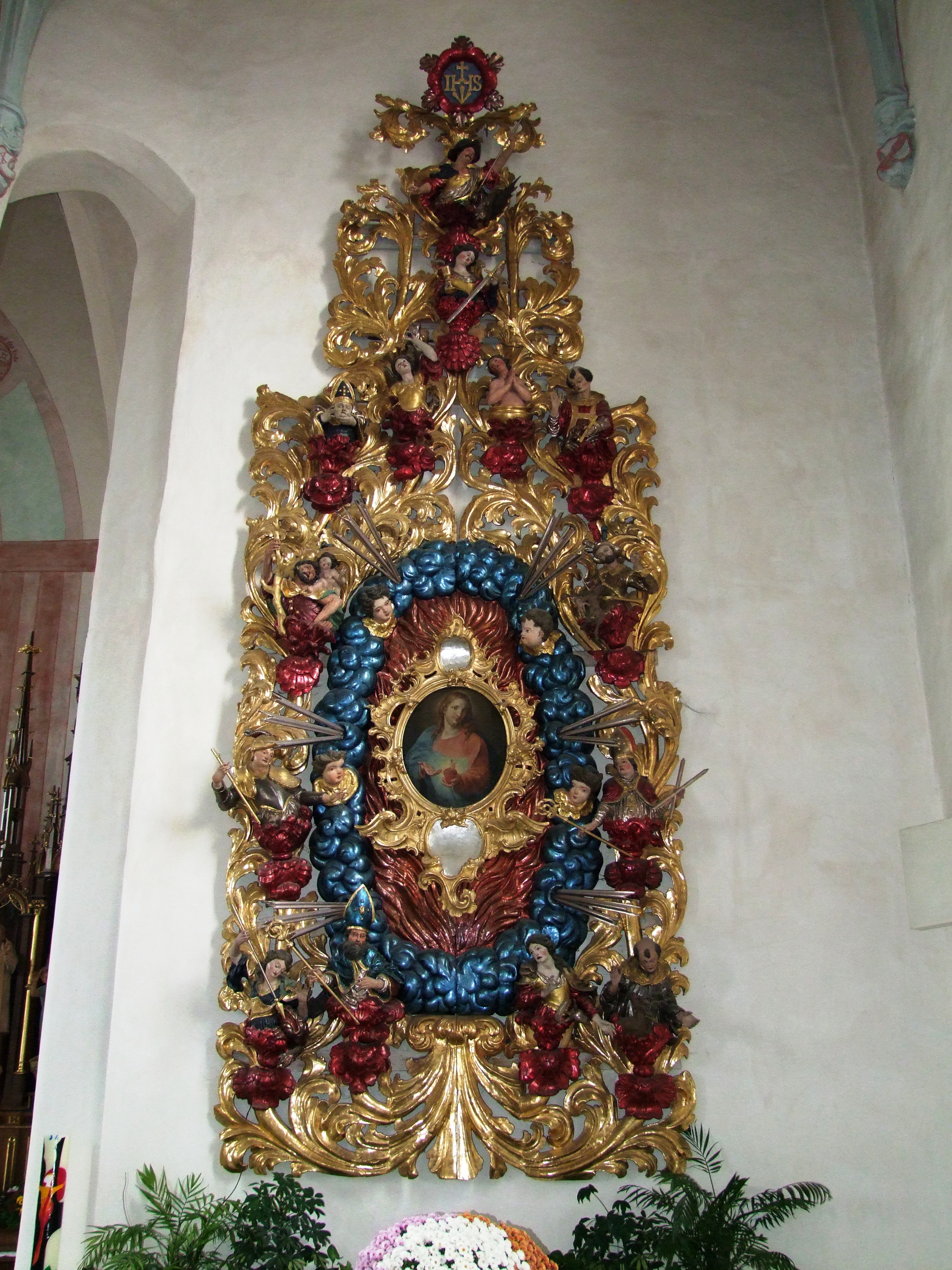 Pfarrkirche St. Philipp und Jakob im oberschwäbischen Bad Grönenbach